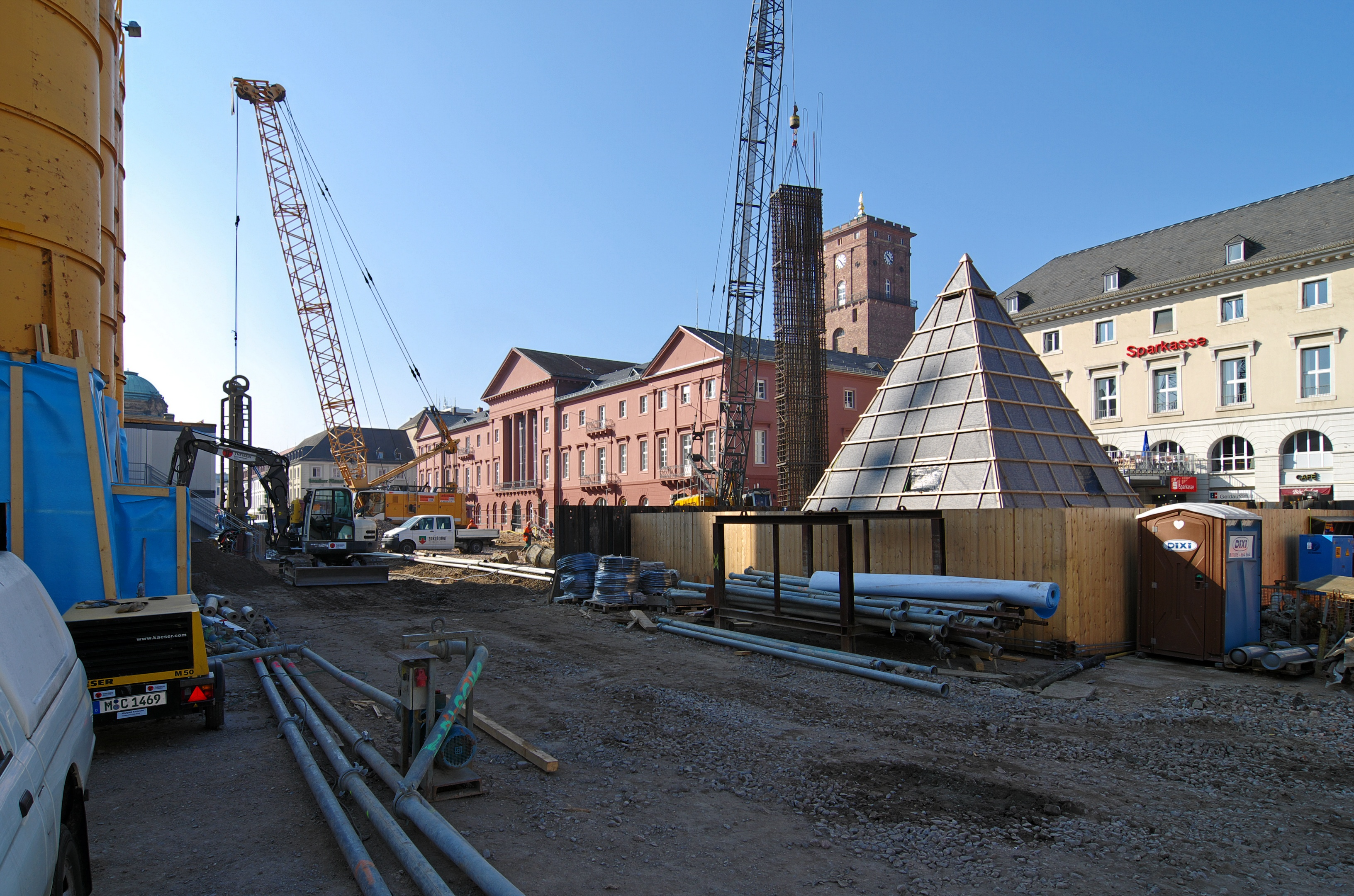 Der Karlsruher Marktplatz im März 2014 als Baustelle während der Untertunnelungsarbeiten im Rahmen der Kombilösung. Die Pyramide ist eingehaust, das Rathaus hat trotz der langwierigen Großbaustelle kurz zuvor einen neuen Farbanstrich erhalten.